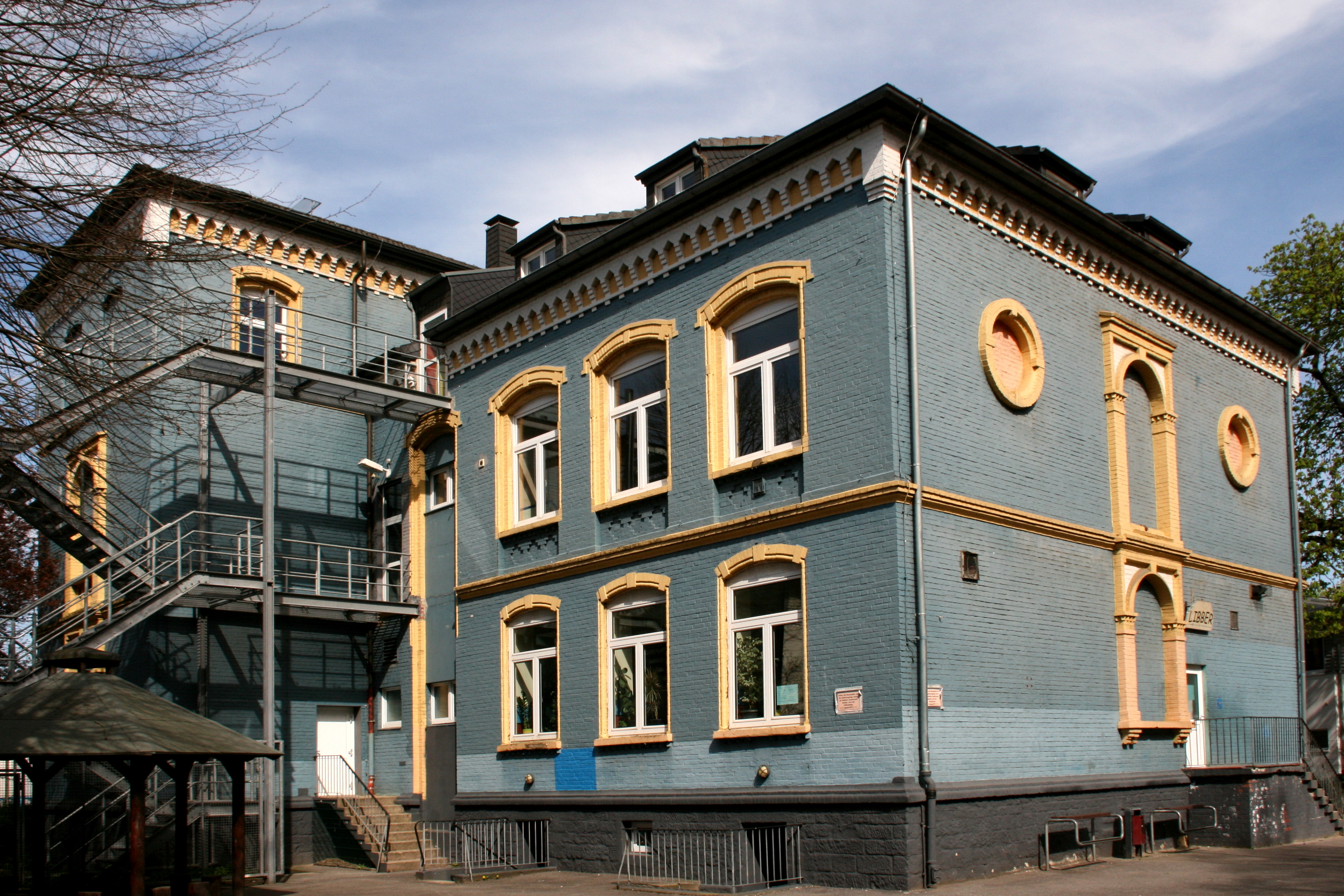 Jugendzentrum, Schulstraße 13 in Gevelsberg